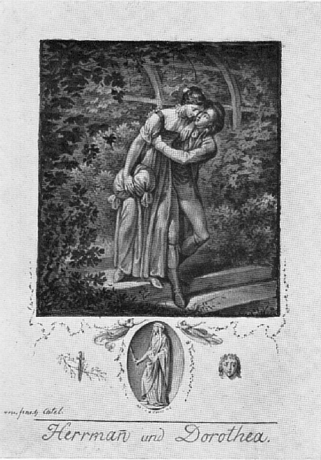 Tuschzeichnungen von Franz Ludwig Catel (1778-1856) zu "Hermann und Dorothea" Für die Kupfer von Vierwegs Ausgabe von 1799 verfertigte Catel neun Zeichnungen, von denen hier zwei nach den Originalen gegeben werden. Hans Wahl, Anton Kippenberg: Goethe und seine Welt, Insel-Verlag, Leipzig 1932 S.125 Urheber Franz Ludwig Catel (1778-1856) Zitat der Genehmigung des Urhebers für eine freie Lizenz Die Urheberrechts-Schutzdauer des hier abgebildeten flächigen Kunstwerks ist weltweit abgelaufen, da der Künstlerbereits seit über 70 Jahren tot ist. Es ist somit gemeinfrei (»public domain«) Anmerkungen 1932 im Besitz der Sammlung Kippenberg